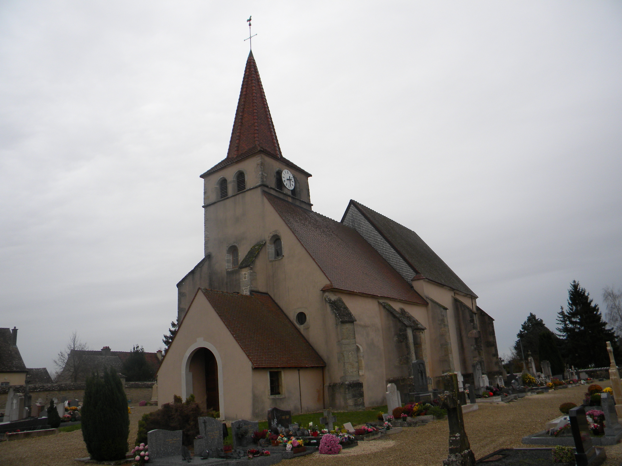 Pregxejo de Sainte-Marie-la-Blanche